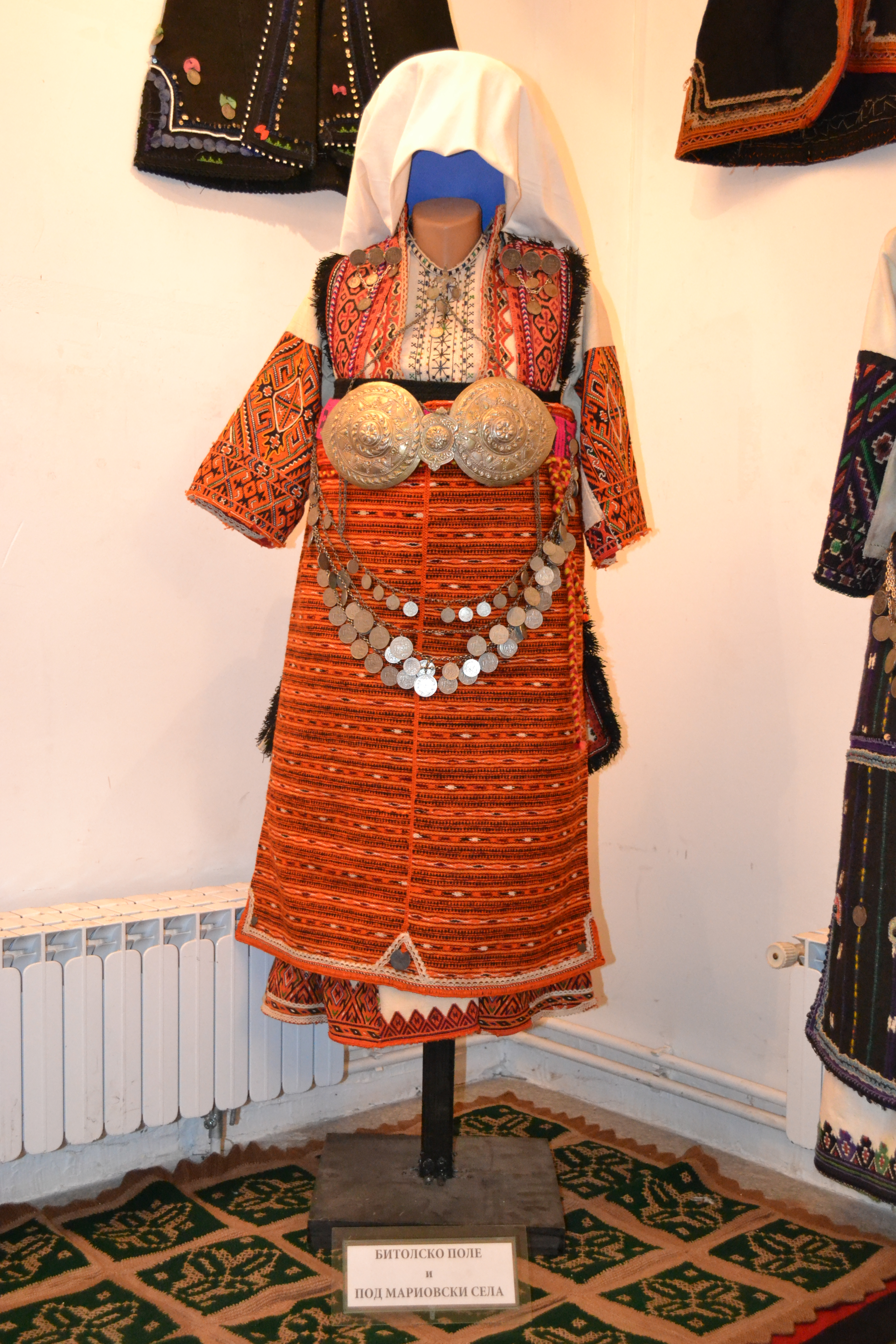 Битолско поле и подмариовските села